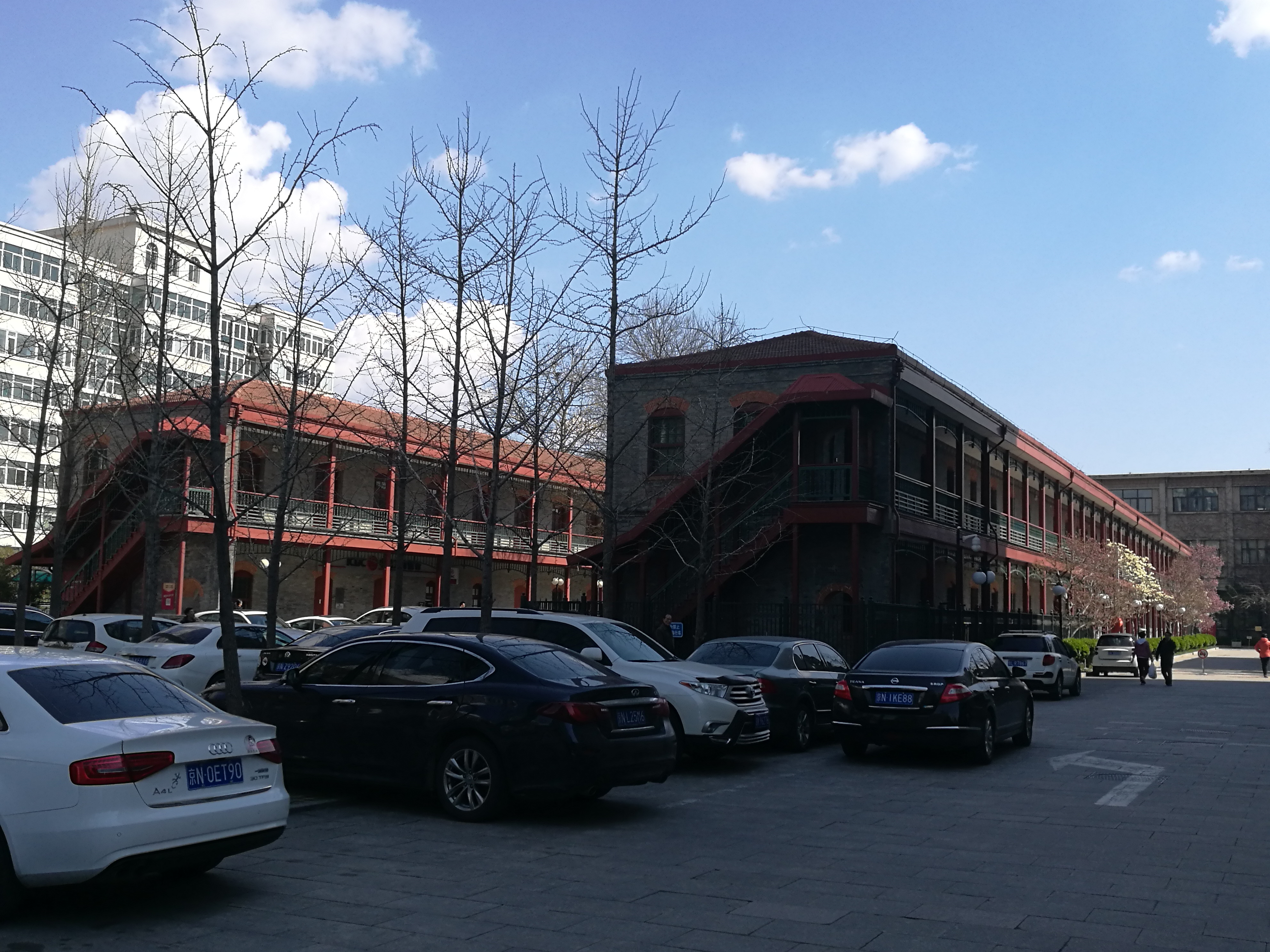 北京国会旧址的仁义楼和礼智楼